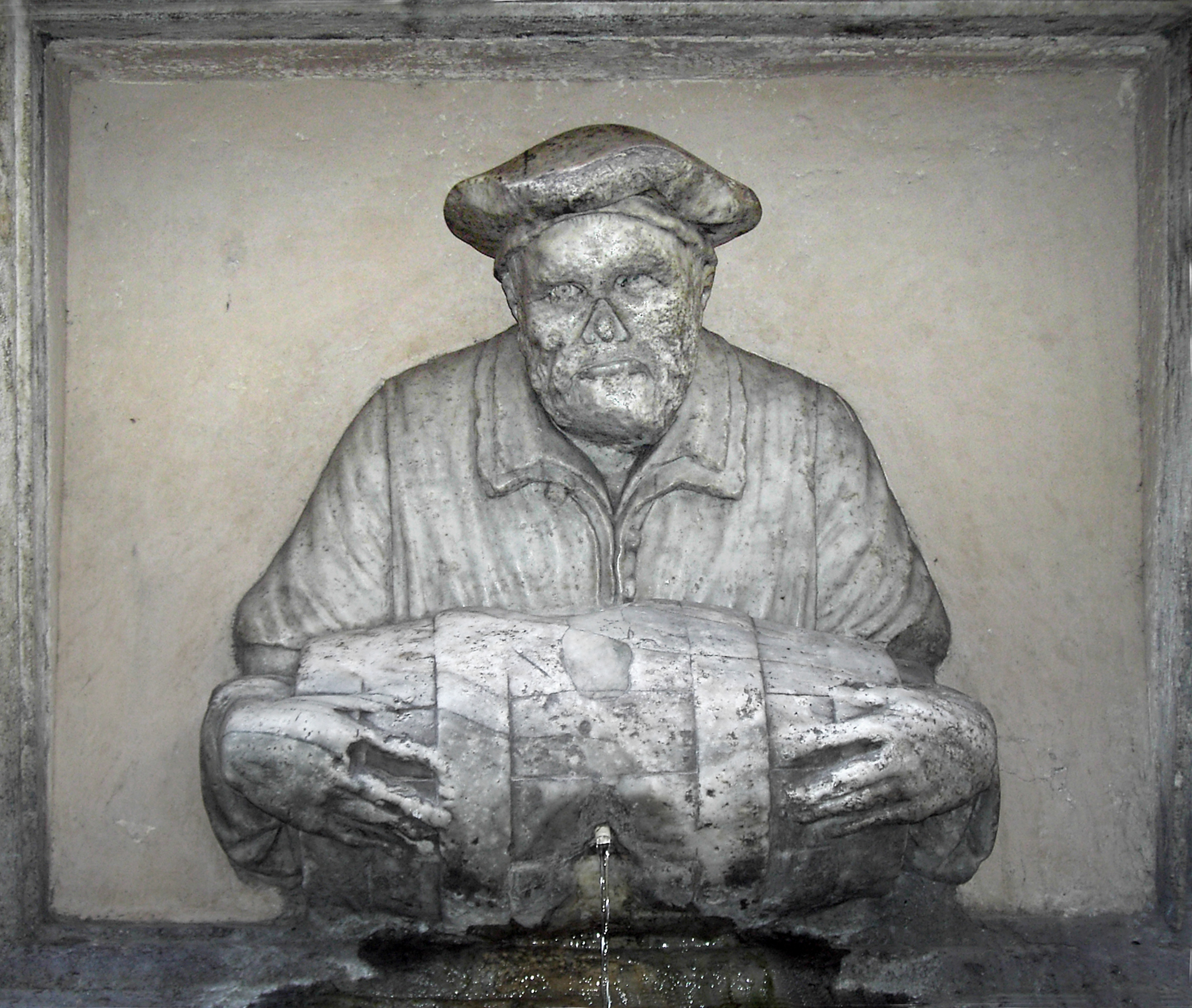 Roma, via Lata angolo via del Corso, Fontana del Facchino.